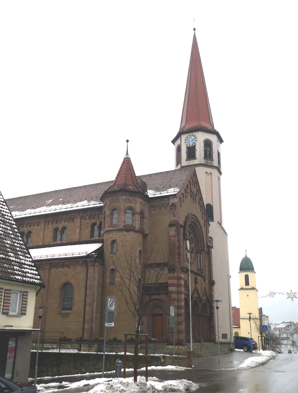 Oberkochen - Kath. Pfarrkirche St. Peter und Paul, im Hintergrund der Turm der Stadtbibliothek